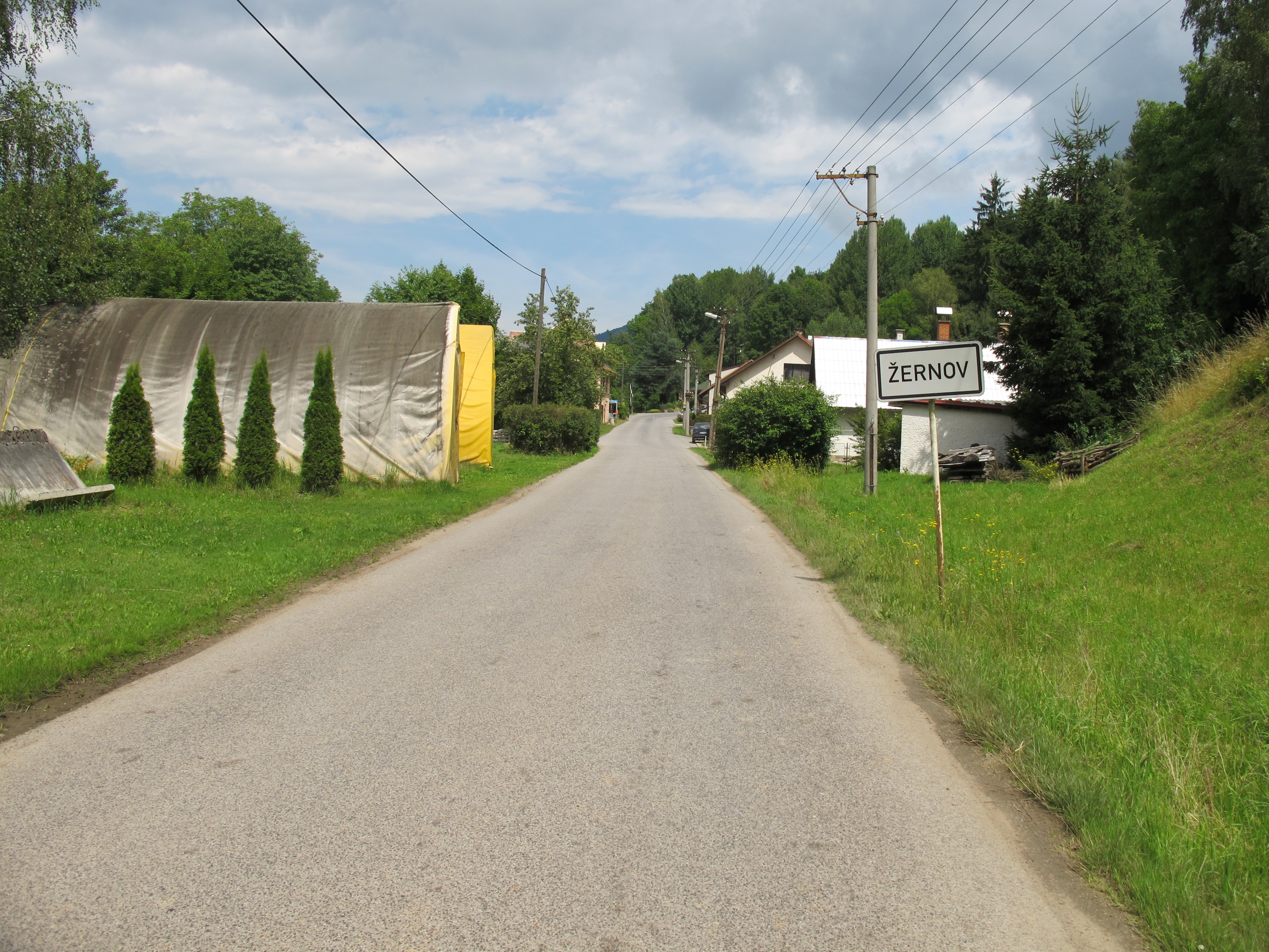 Žernov v okrese Semily - průjezdná komunikace